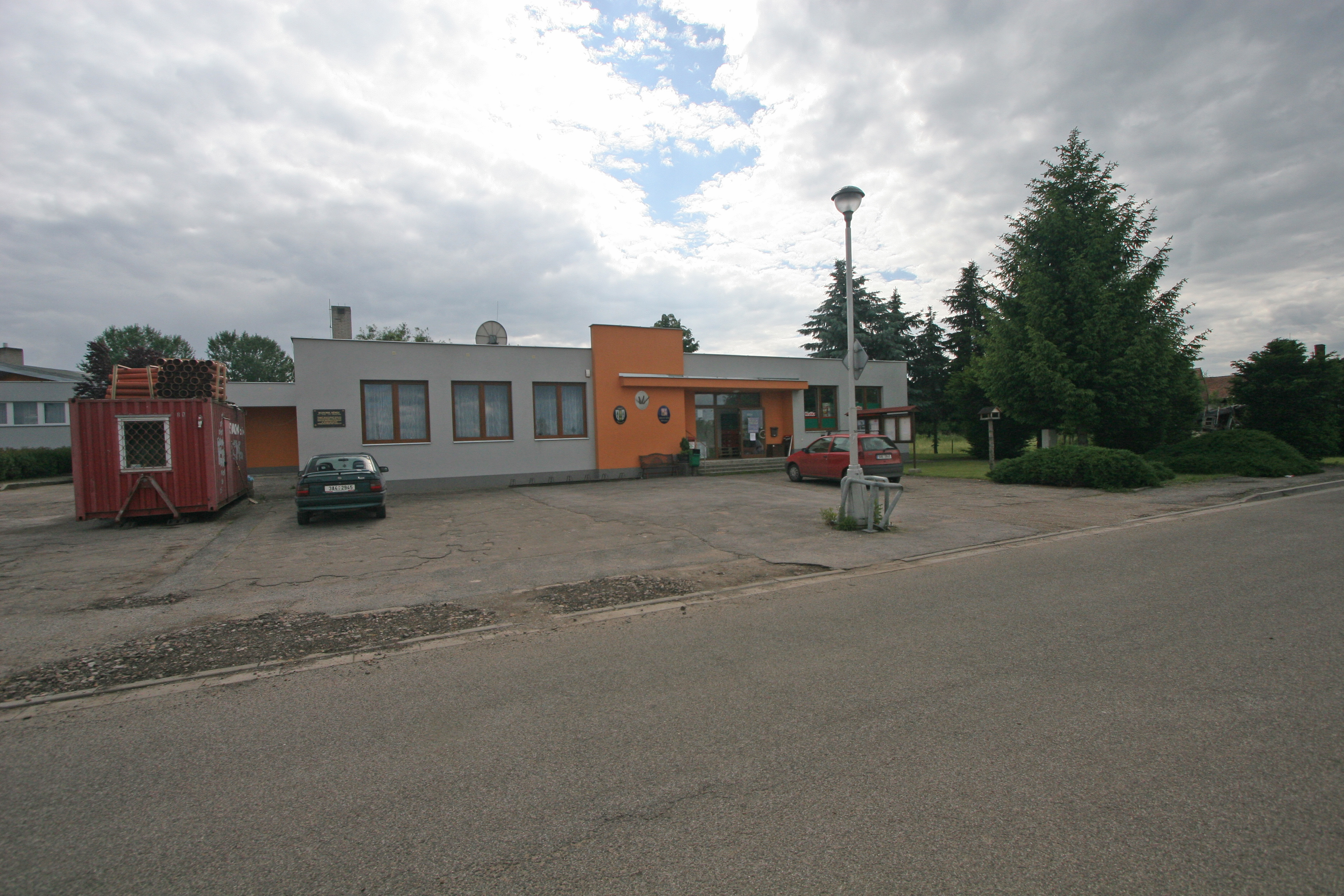 Prasek obecní úřad